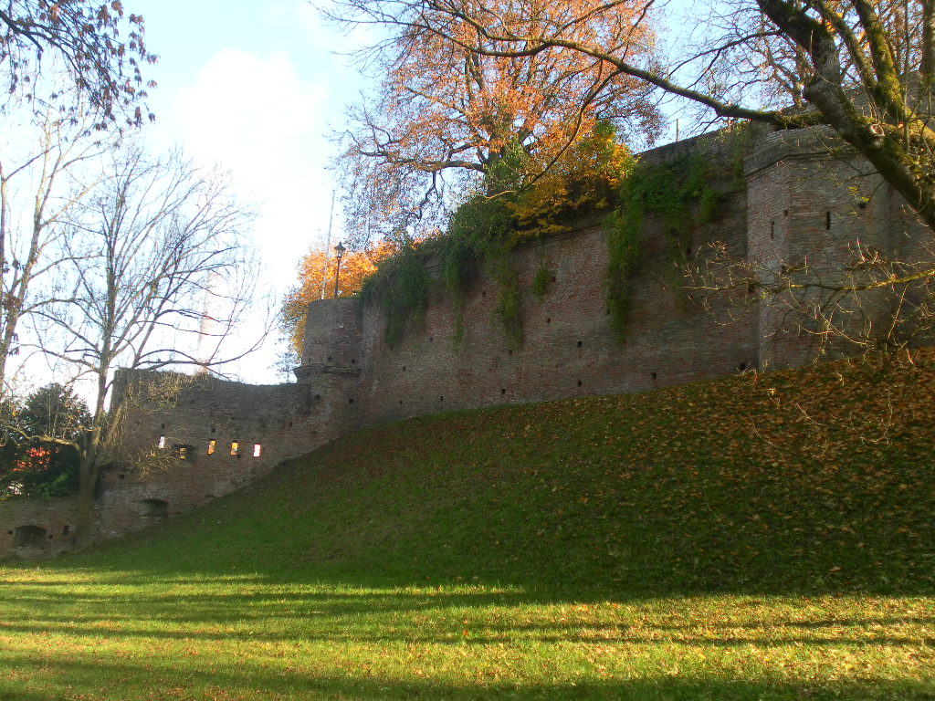 Die Luginslandbastion vom Westen